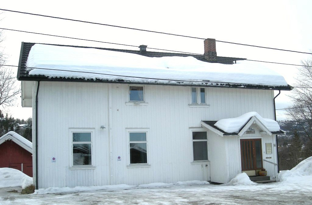 Fredtun asker, som huser Asker pinsemenighet. Adresse. Fredtunveien 50.